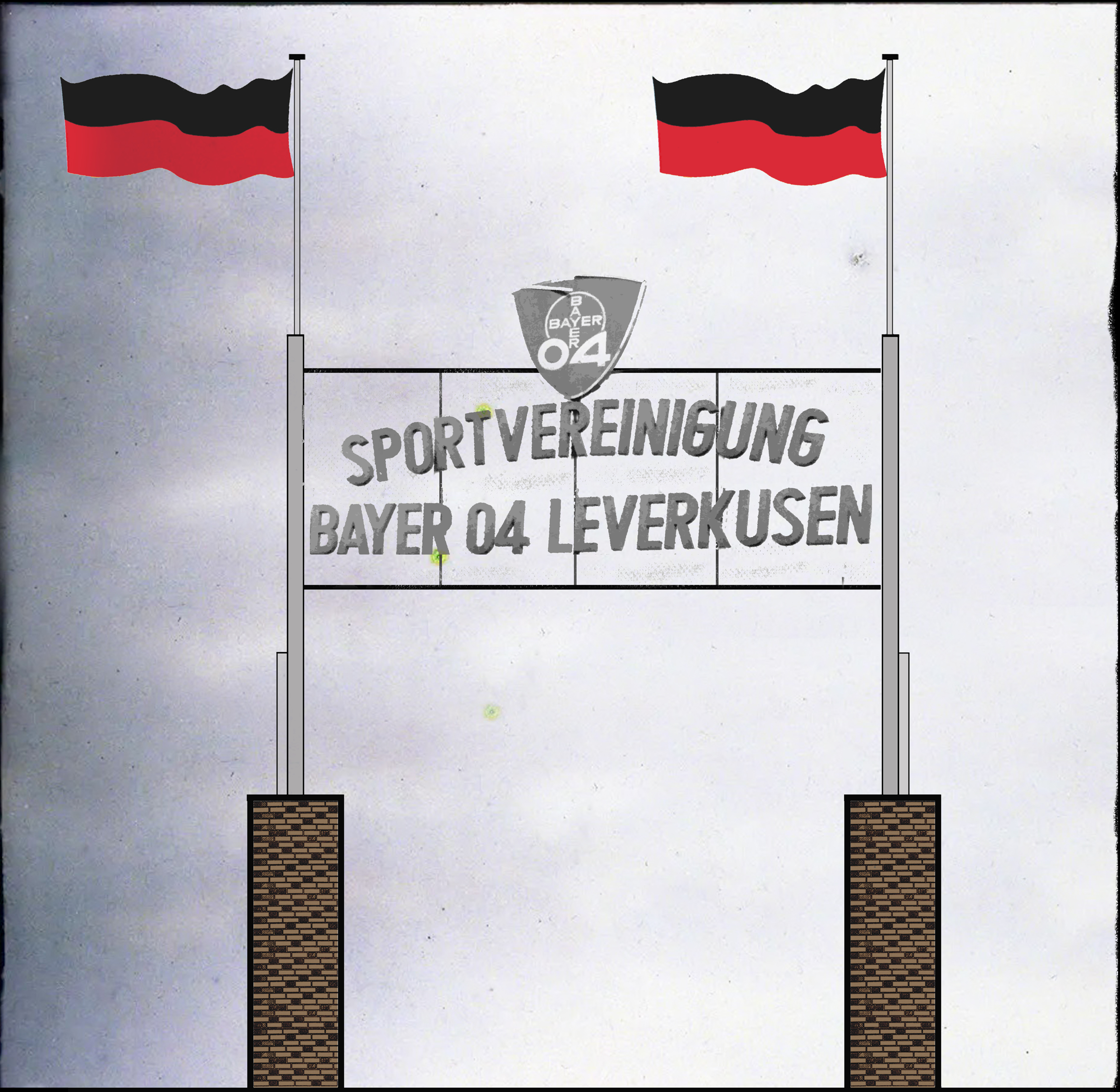 Rekonstruktion des alten Eingangstors zum Leverkusener Stadion am Stadtpark, als Entwurf für die Beratung im Bezirk I